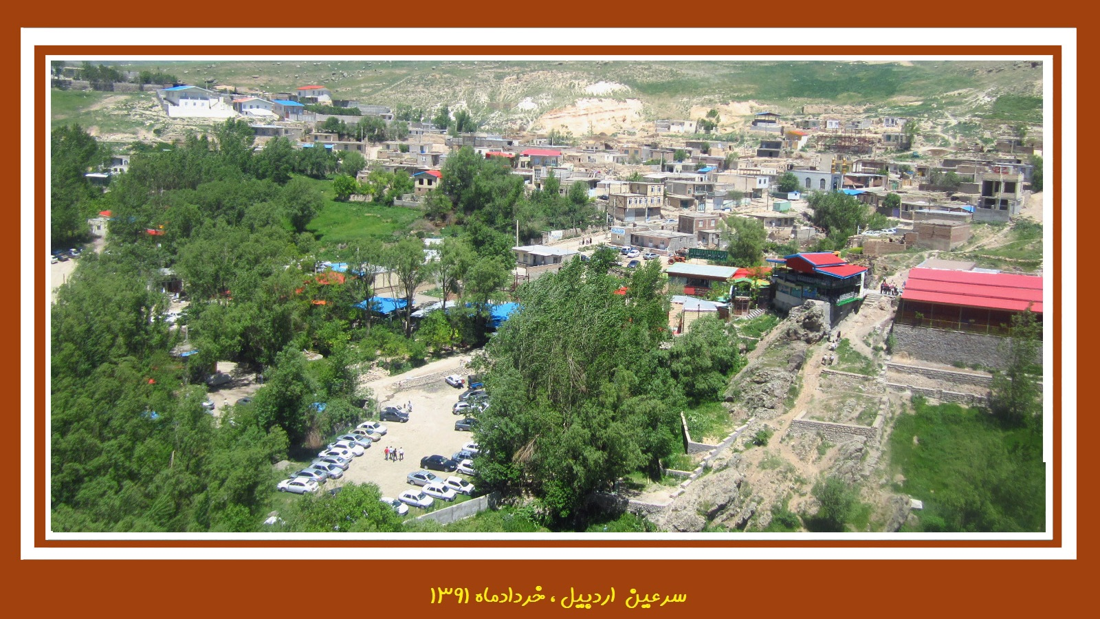 Sareyn Ardabil-سرعین اردبیل